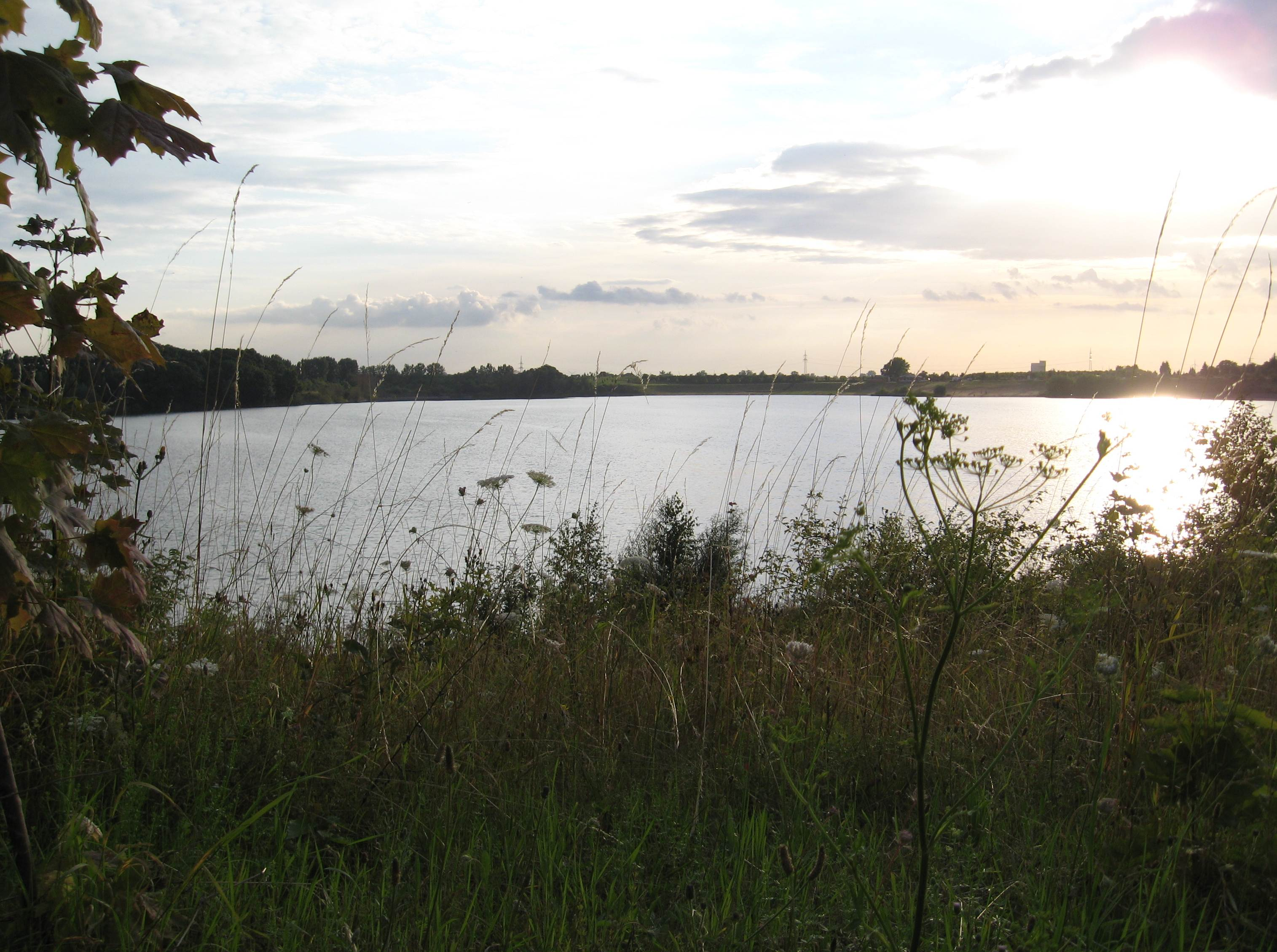 Der See in Edderitz. - Google Maps - Google Earth